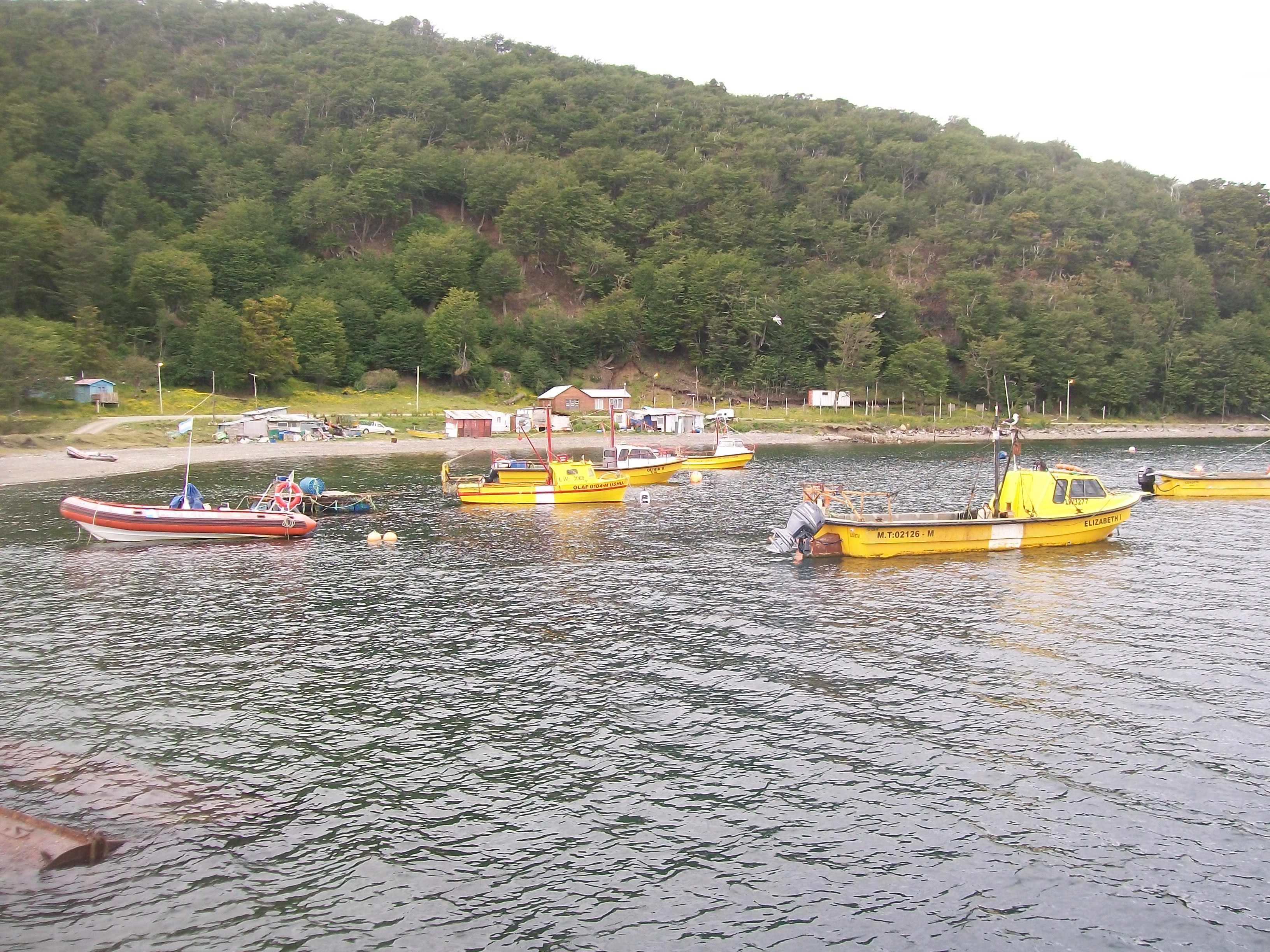 Vista parcial del fondeadero de la la villa Puerto Almanza, sobre el canal de Beagle, Tierra del Fuego, Argentina